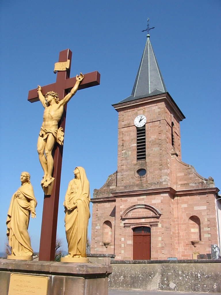 Saint-Michel-sur-Meurthe, commune des Vosges. Le calvaire devant l'église, Jésus sur la croix entre la Vierge Marie et Saint-Jean.